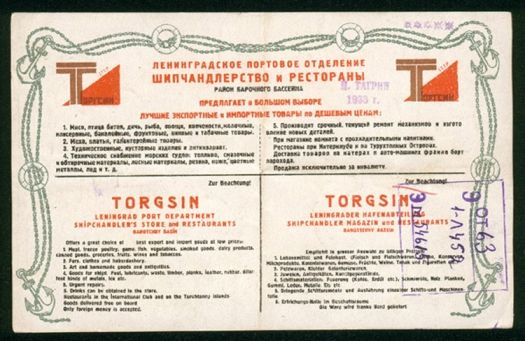 Torgsin advertisement